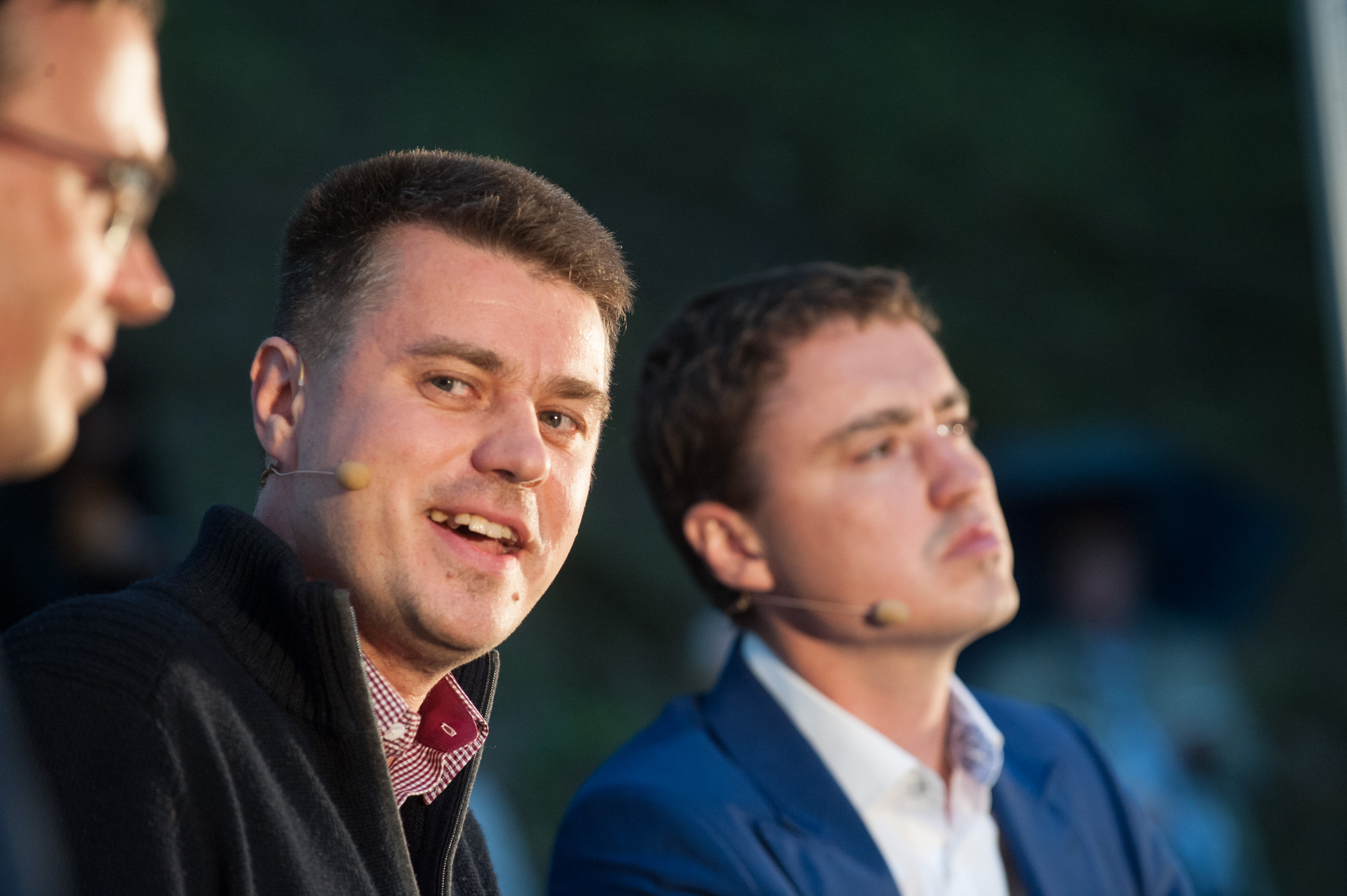 Arvamusfestival 2014: Parlamendierakondade juhtide debatt